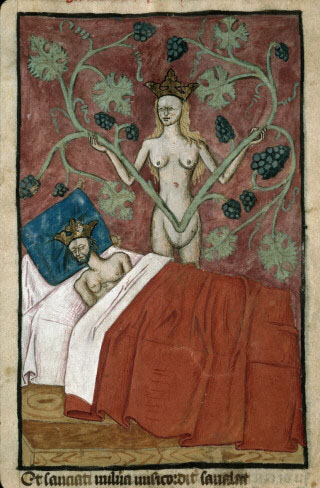 Marseille - BM - ms. 0089, f. 004v